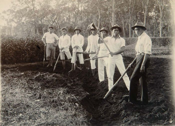 Foto. Groep jongens tijdens het graven van een greppel